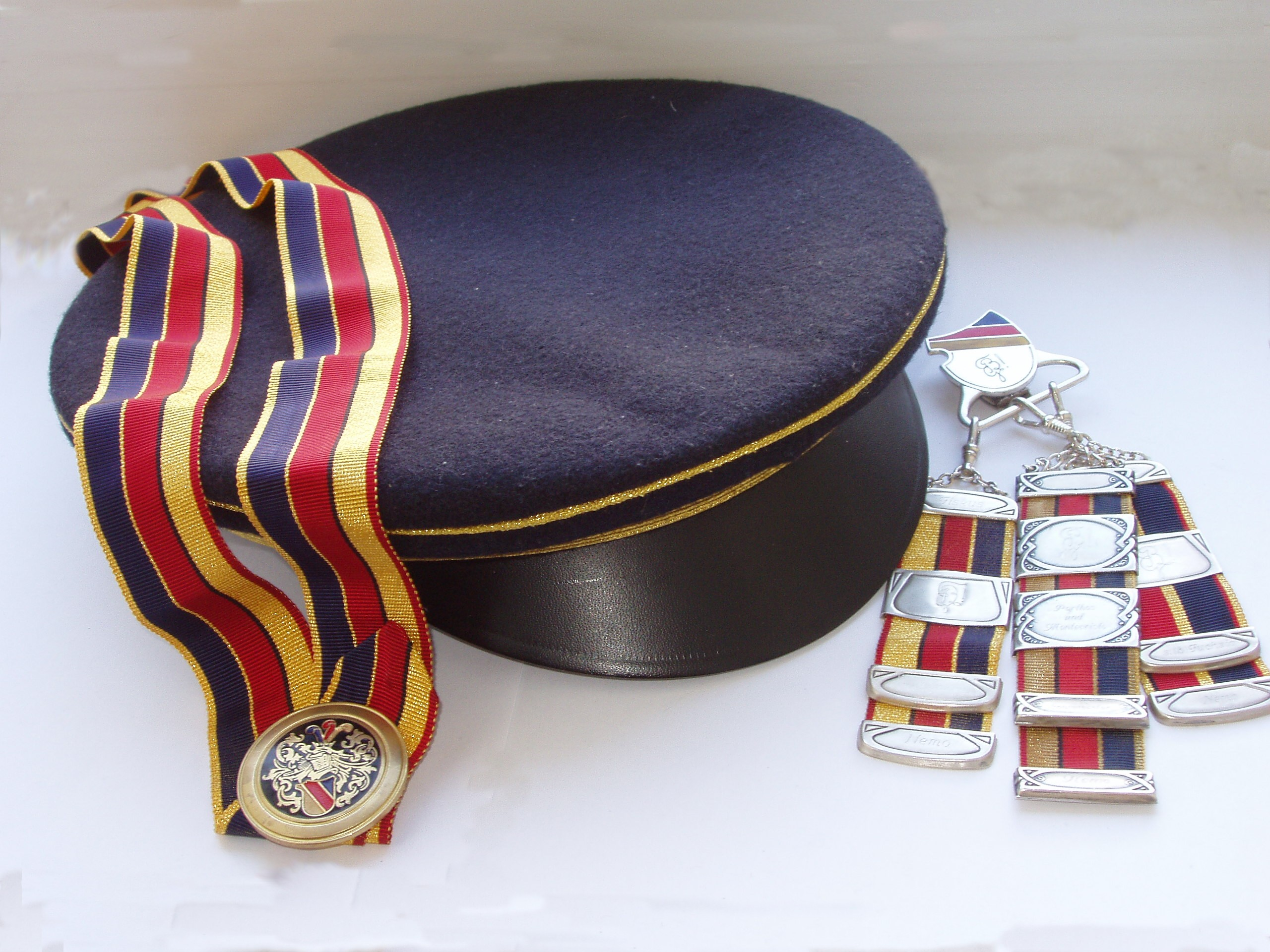 Das Couleur der Bajuvaria Wien (Deckel, Band, Zipfe)